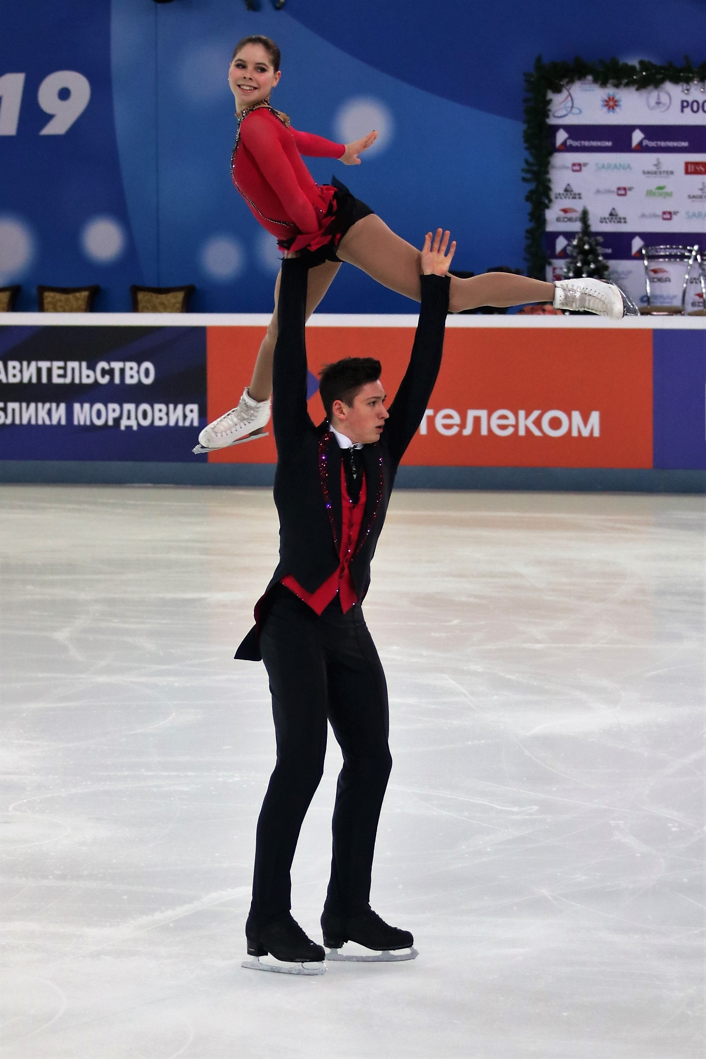 Анастасия Мишина и Александр Галямов на чемпионате России по фигурному катанию на коньках 2019